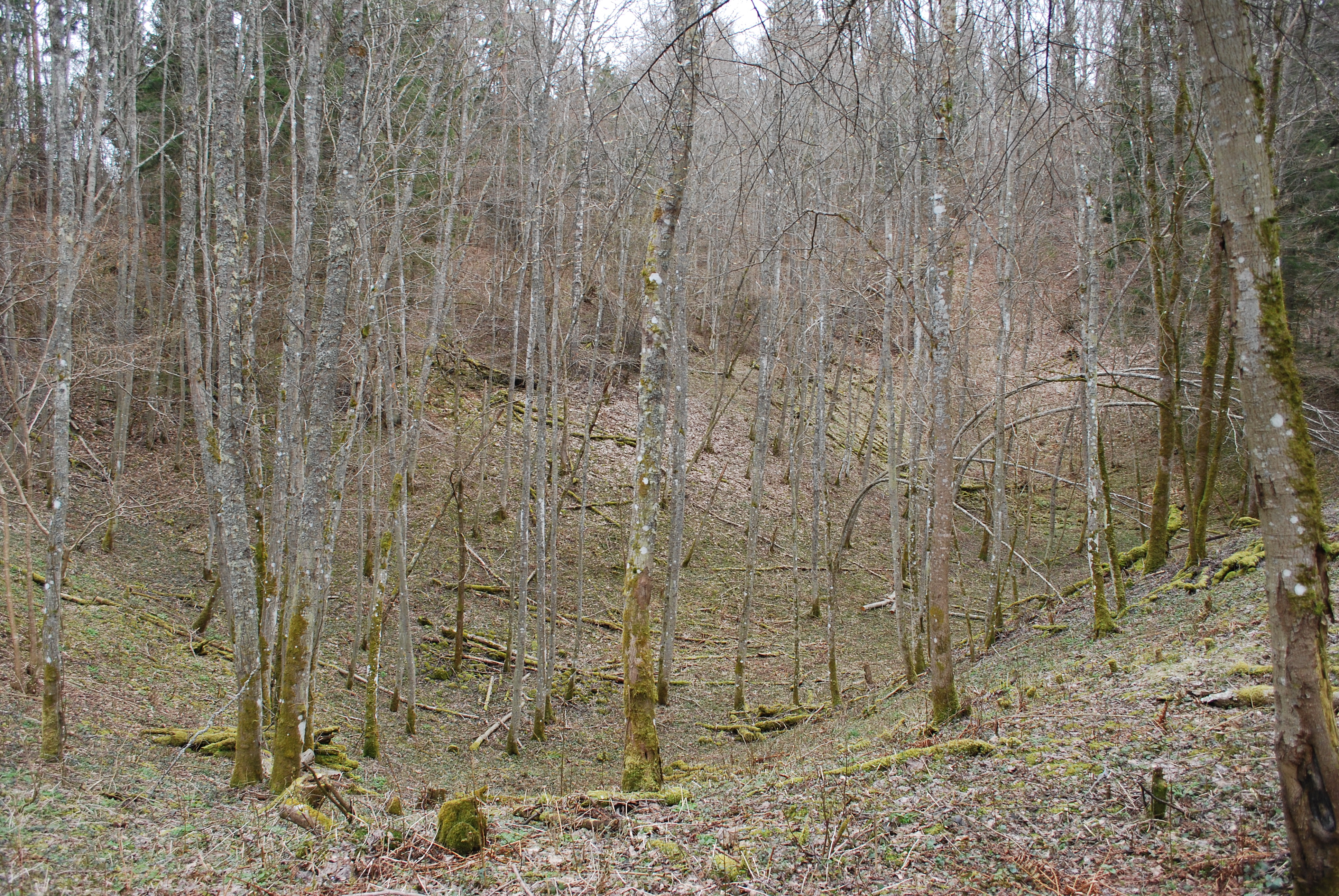 Üks kolmest Vanapagana jäljehauast Paganamaal, Võrumaal.